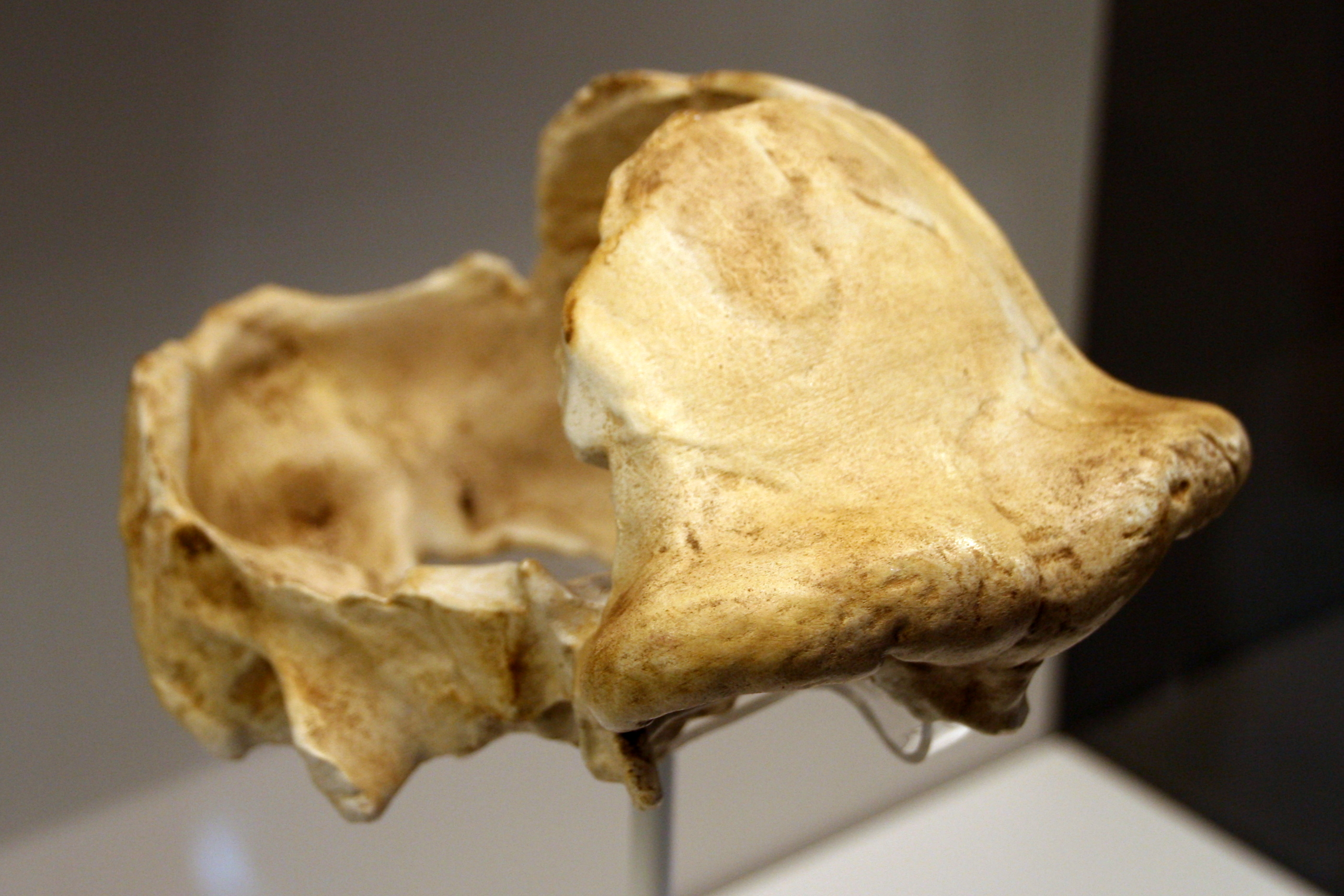 Cráneo de Homo erectus / ergaster. OH 9. Réplica Original: LLK, Garganta de Olduvai (Tanzania) 1,25 millones de años Museo Nacional de Dar Es Salaam, Tanzania Réplica: Instituto de Evolución en África, IDEA, Madrid Exhibido en exposición temporal, "La cuna de la humanidad", en el Museo Arqueológico de Regional de Madrid